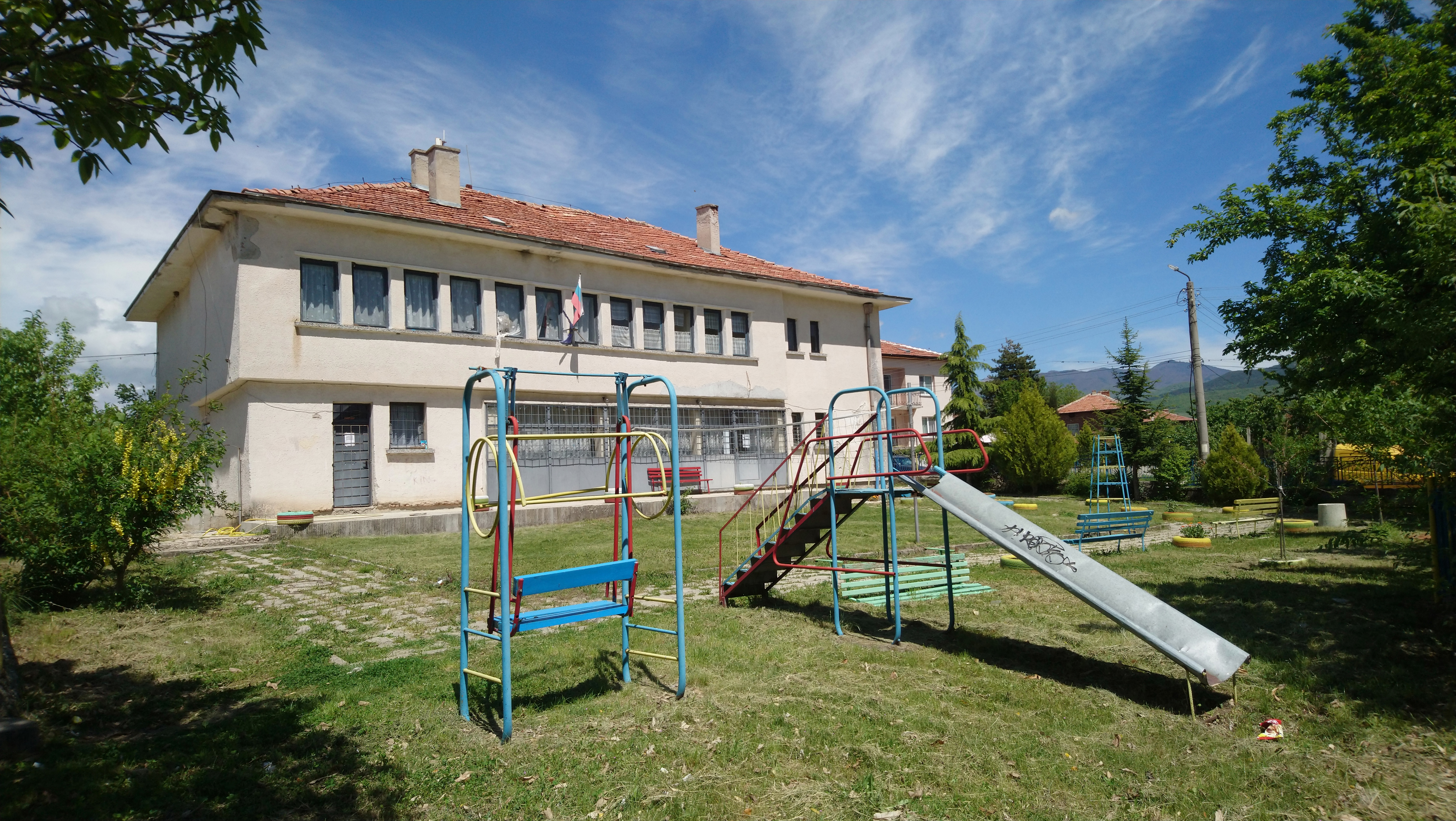 Кметството на село Яново и детската площадка пред него